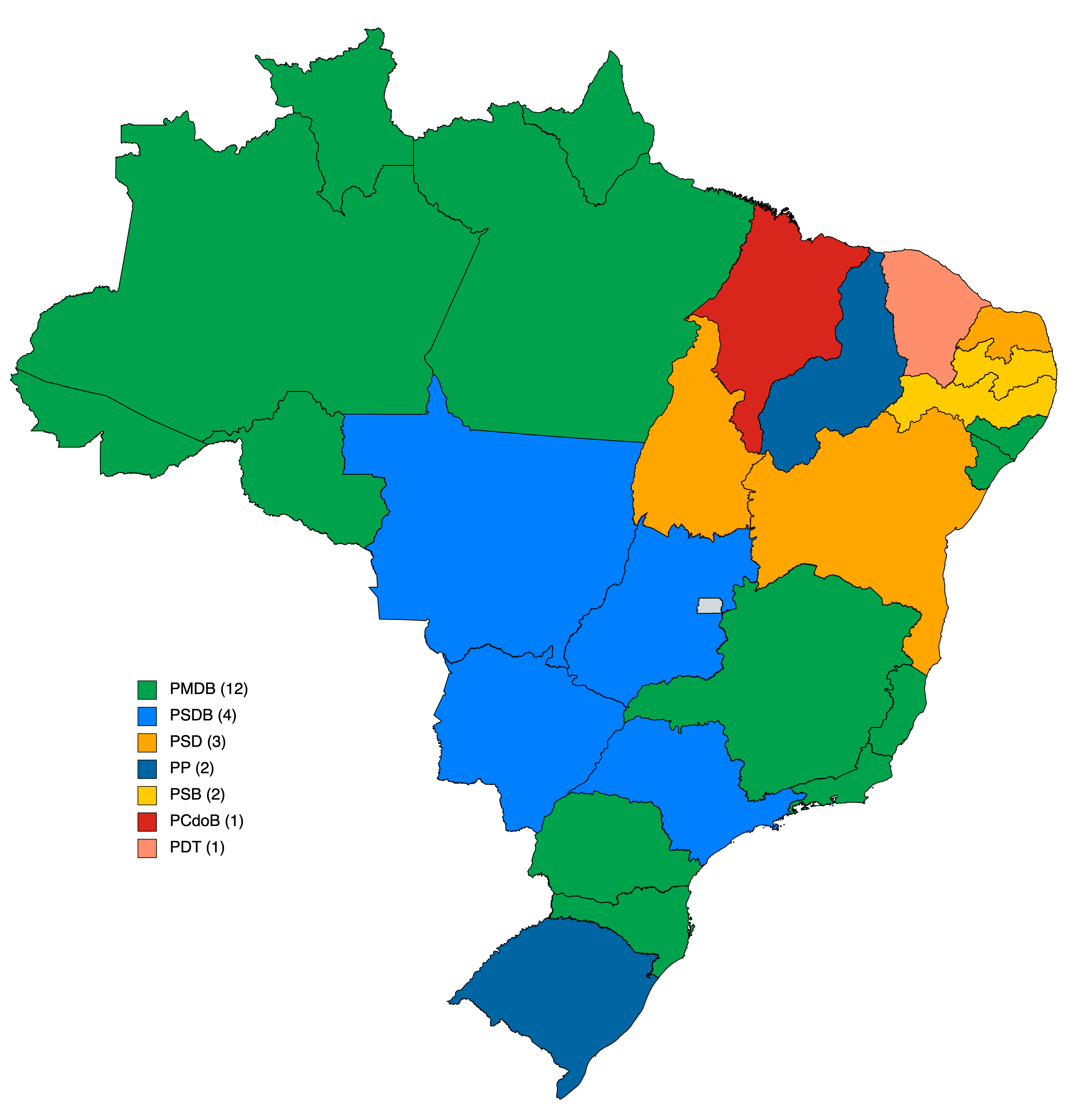 Mapa dos partidos que mais conquistaram prefeituras por estado.